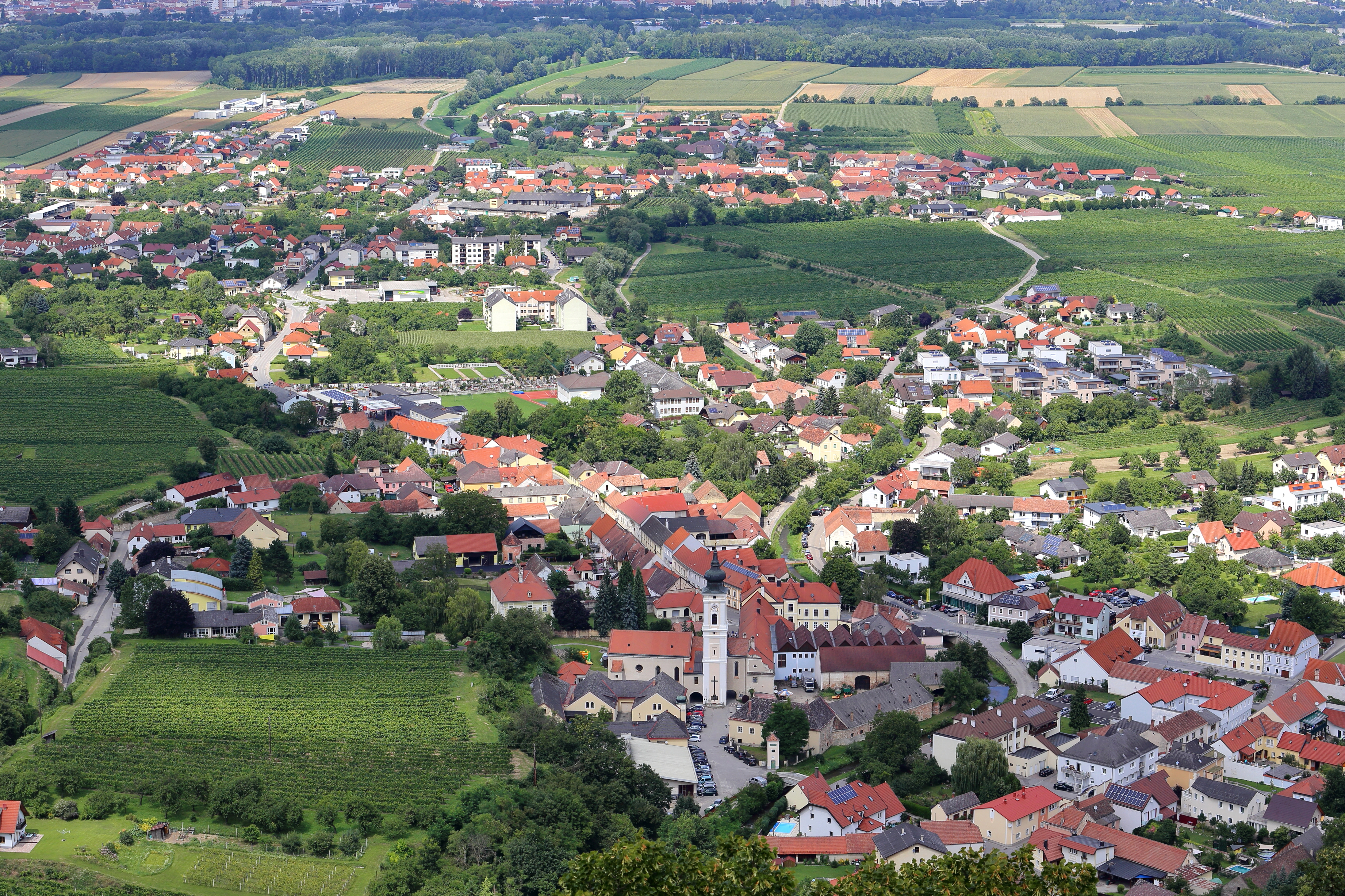 Blick vom Stift Göttweig Richtung Norden. Im Vordergrund der Ortskern der niederösterreichischen Marktgemeinde Furth bei Göttweig und dahinter die ebenfalls zur Marktgemeinde gehörende Ortschaft Palt.